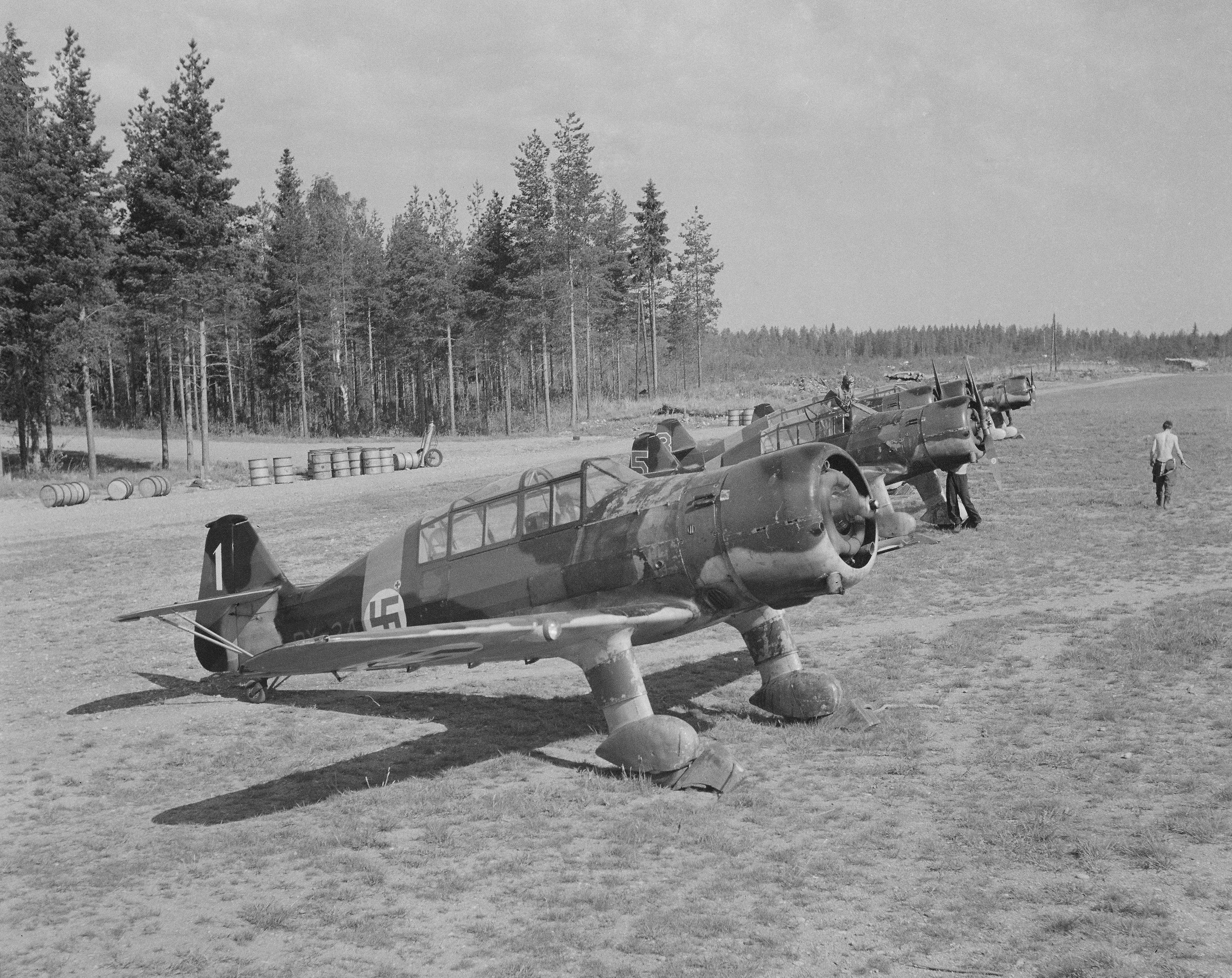 Harjoituskoneita valmiina lentoa varten (Pyry). Kuvattu Vesivehmaalla. (SA-kuva 129794)